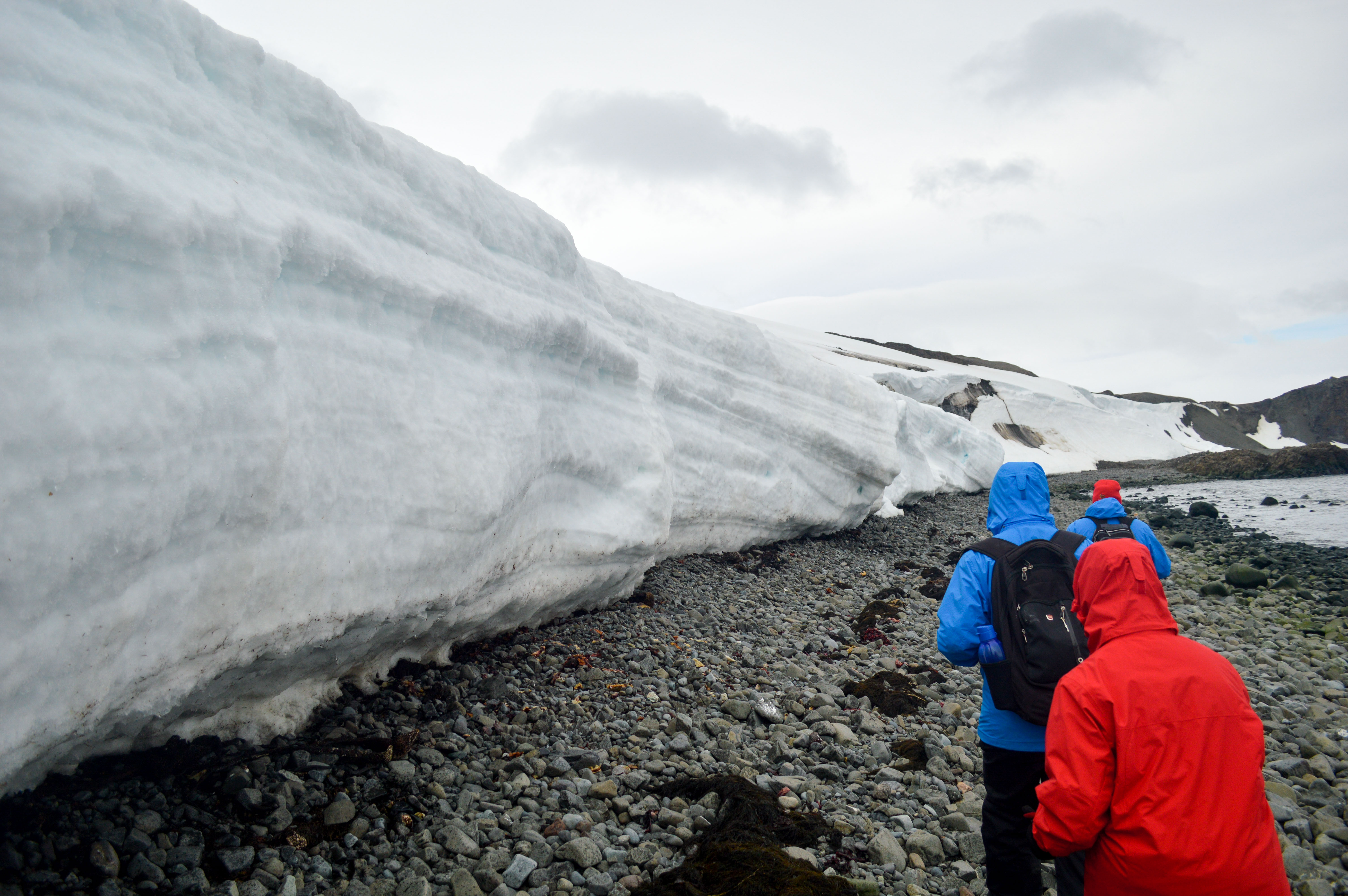 Fotografía tomada por estudiante de la tercera edición de la EVIIA (Ary Mailhos) en la base del glaciar Collins, Península Fildes, Isla Rey Jorge en las islas Shetland del Sur.